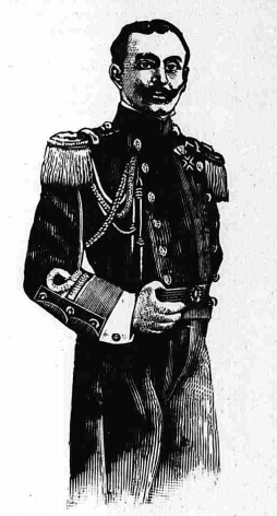 Ο Περικλής Αργυρόπουλος, στρατιωτικός του πολεμικού ναυτικού και υπουργός